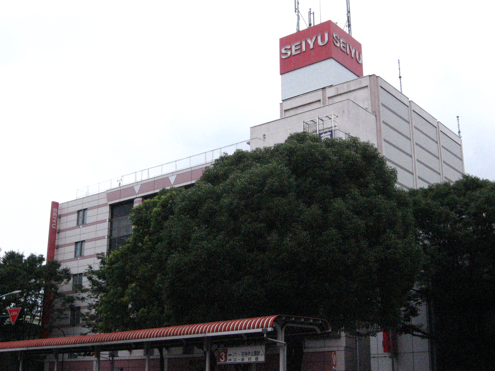 SEIYU Asagaya store. Suginami, Tokyo.